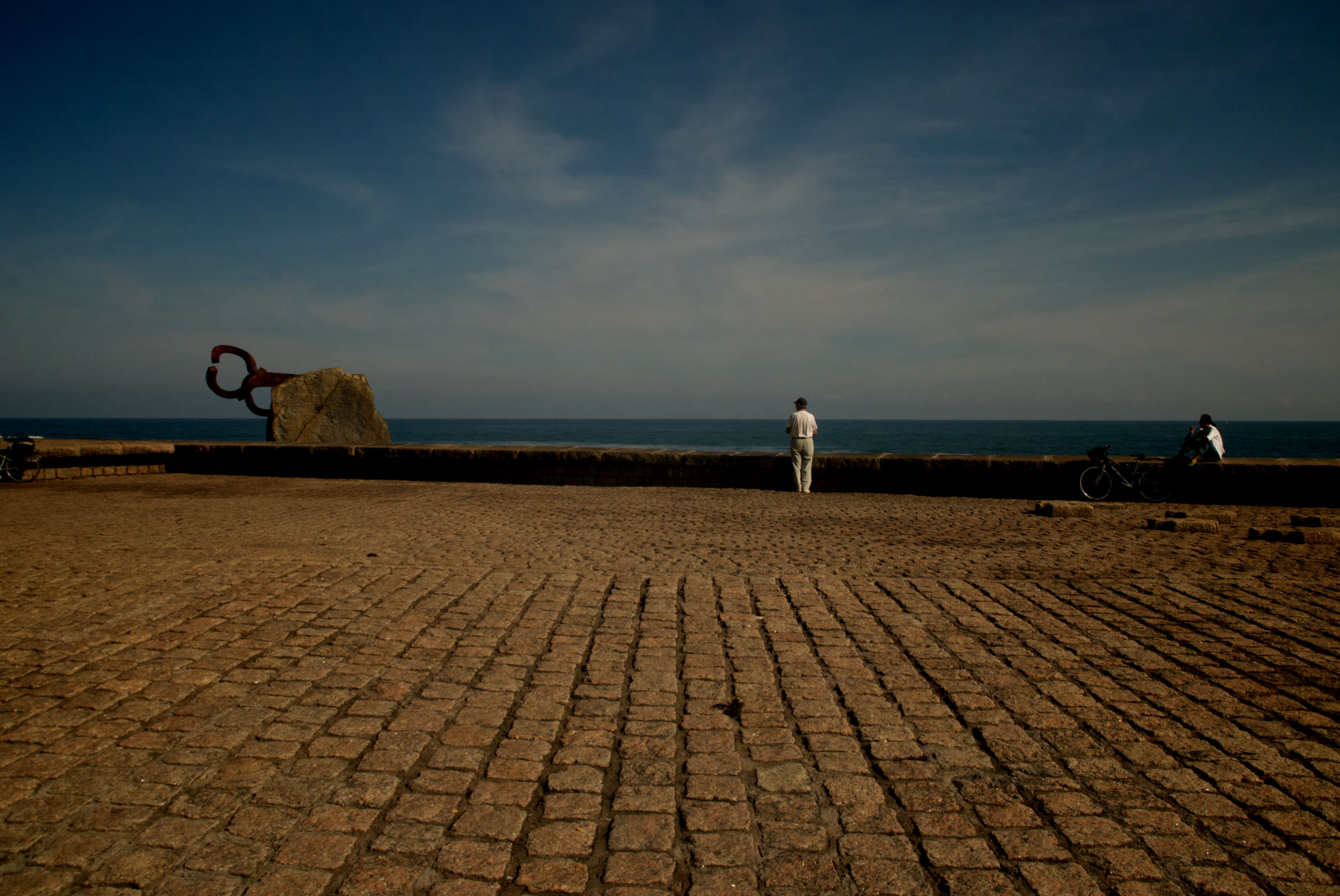 Haizearen orrazia